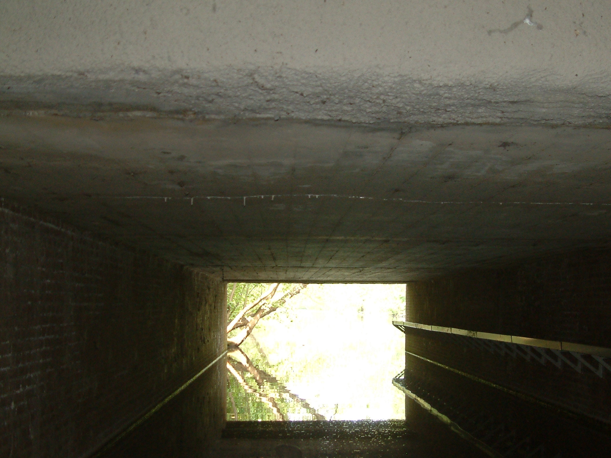 Bridges in The Hague as mentioned in the filename.